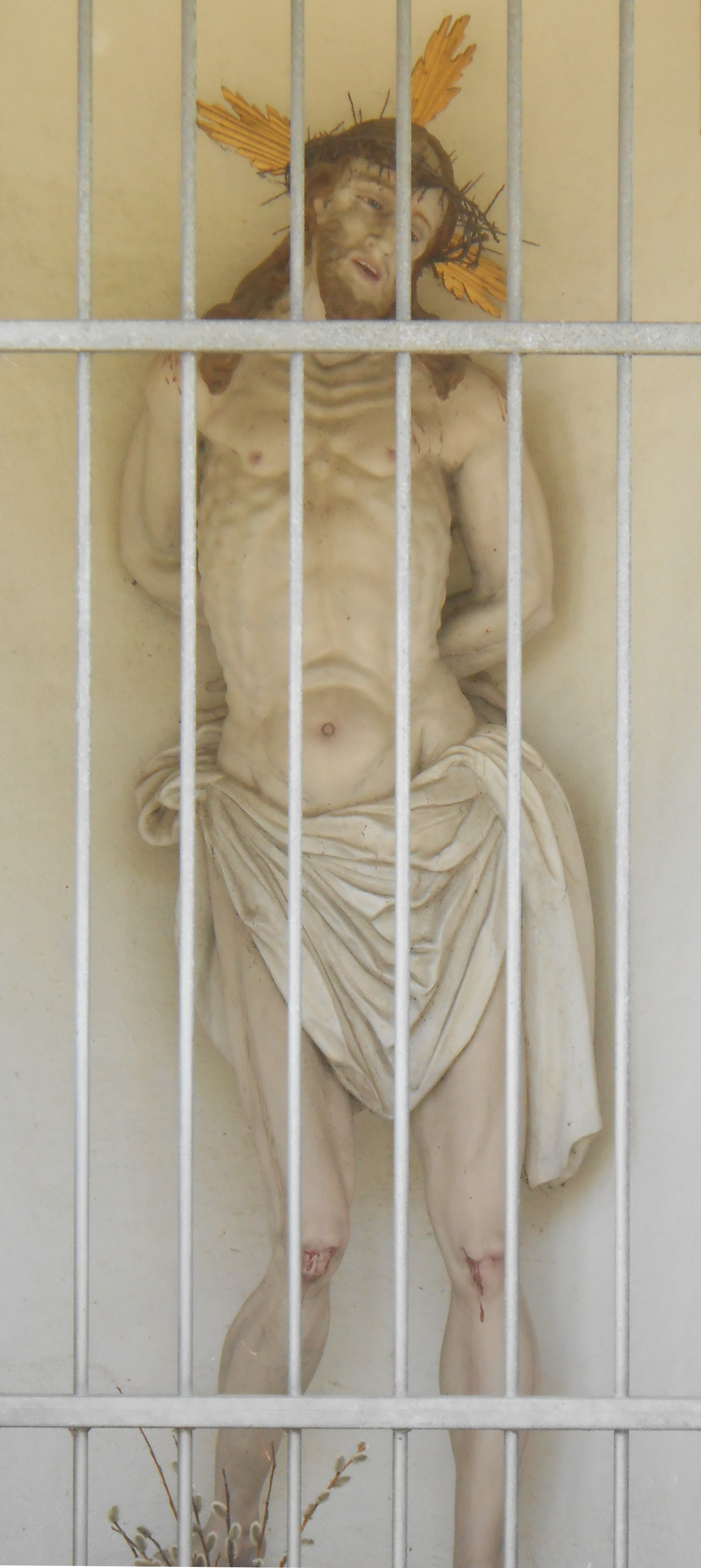 Geiselheiland in der Kapelle bei der Straße nach Schnuttenbach